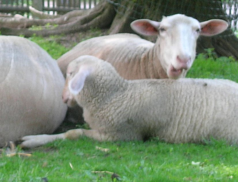 Leineschafe im Alternativen Bärenpark Worbis.